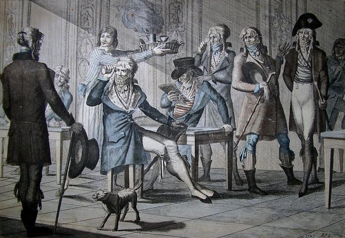 Cafe des Incroyables. Ma parole d’honneur ils le plaisante.